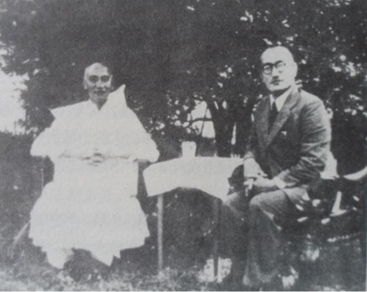 中文（中国大陆）: 李范奭与蒋介石1951年在台湾士林别墅